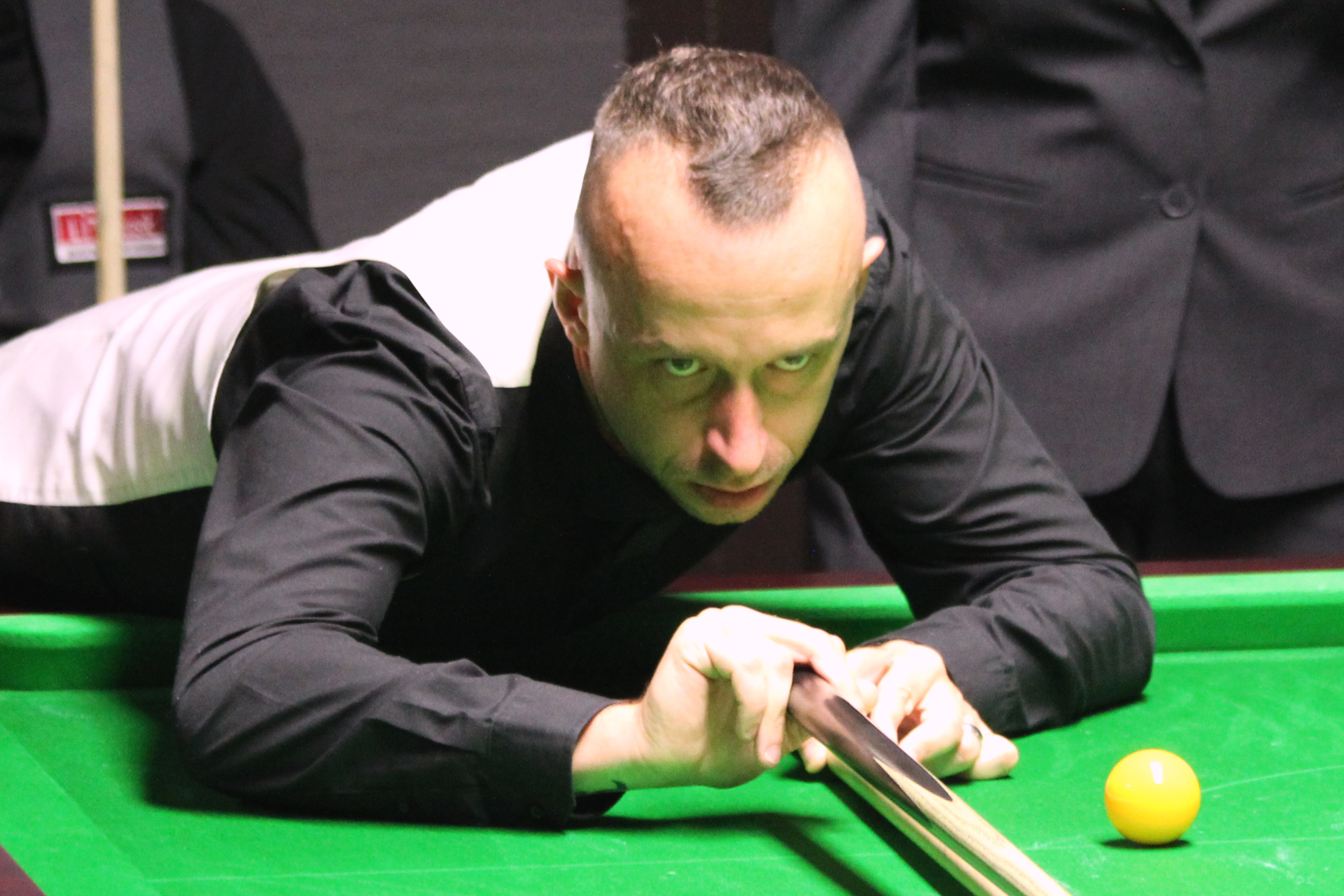 Michael Wild beim Paul Hunter Classic 2016